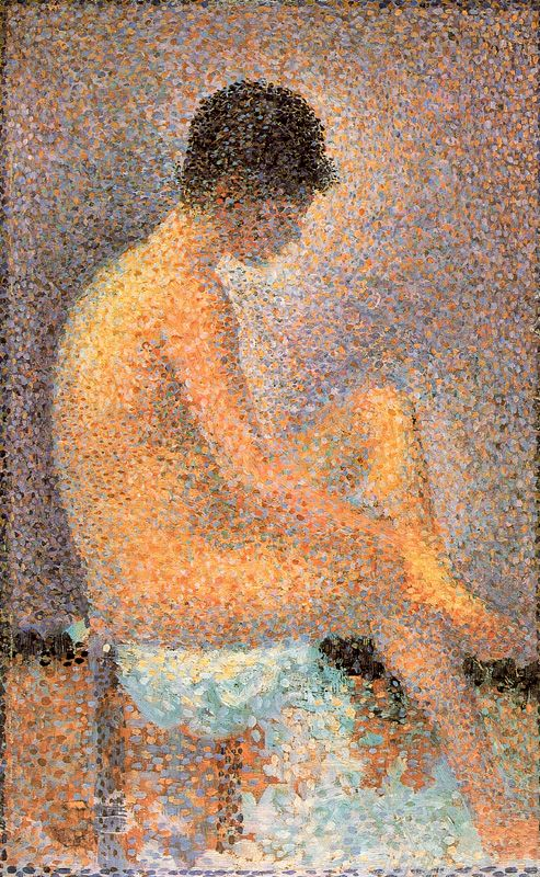 Modella seduta di profilo, o/tv, 24x14,6 cm, M. d'Orsay, Paris